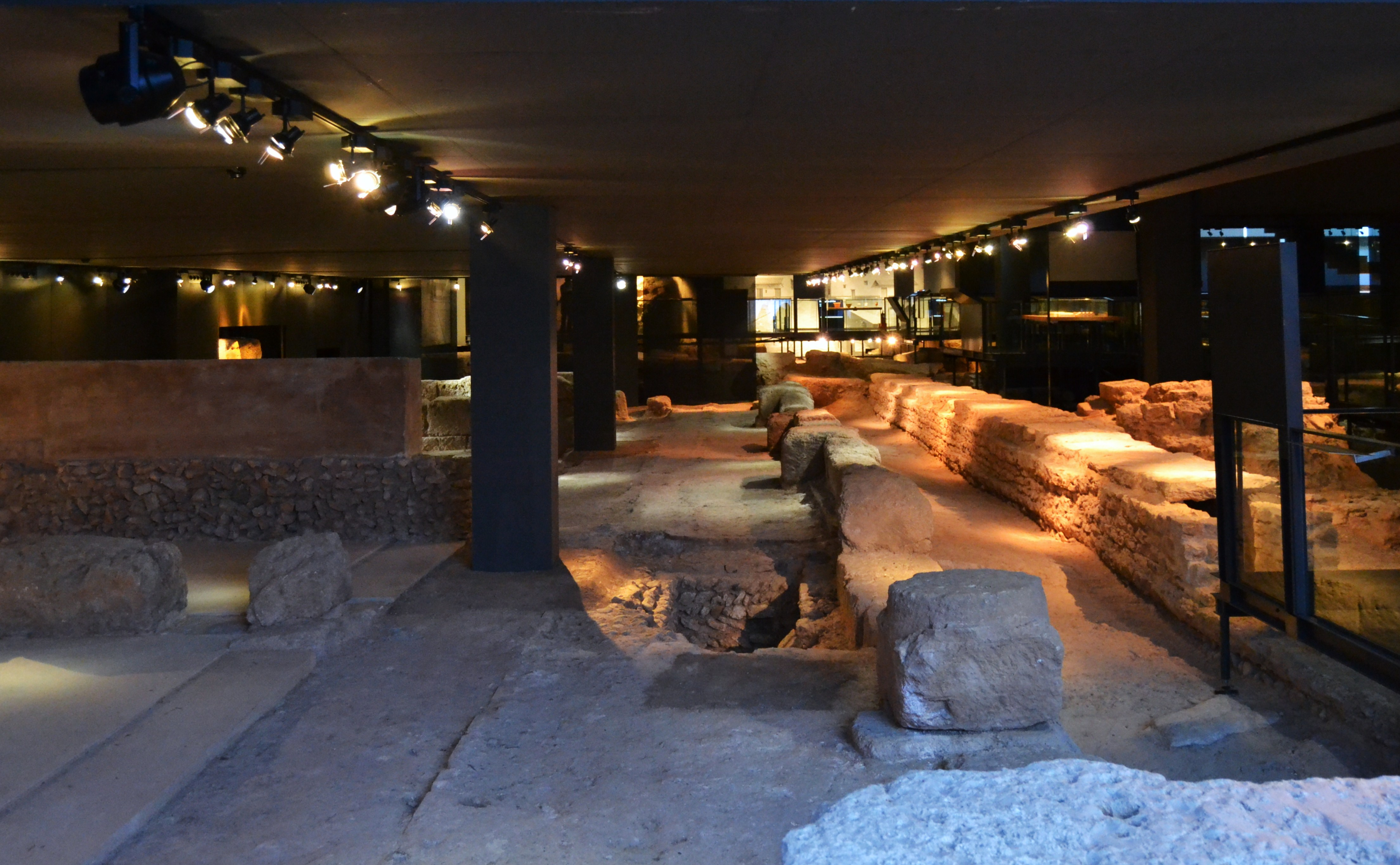 Vista de l'interior del Centre Arqueològic de l'Almoina.